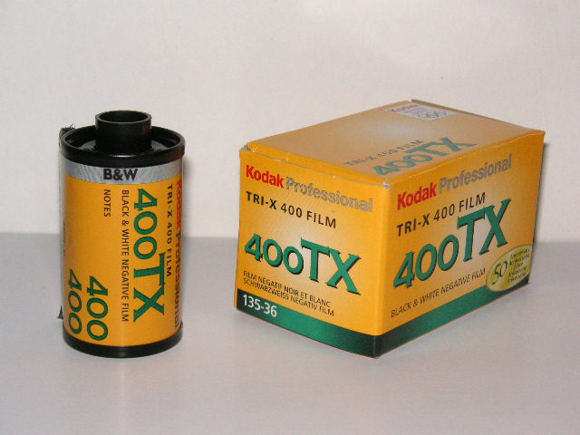 400TX（トライＸ）の（35ミリ判）パトローネと外箱（外箱に発売50周年記念のロゴマークが入っている。本人撮影）